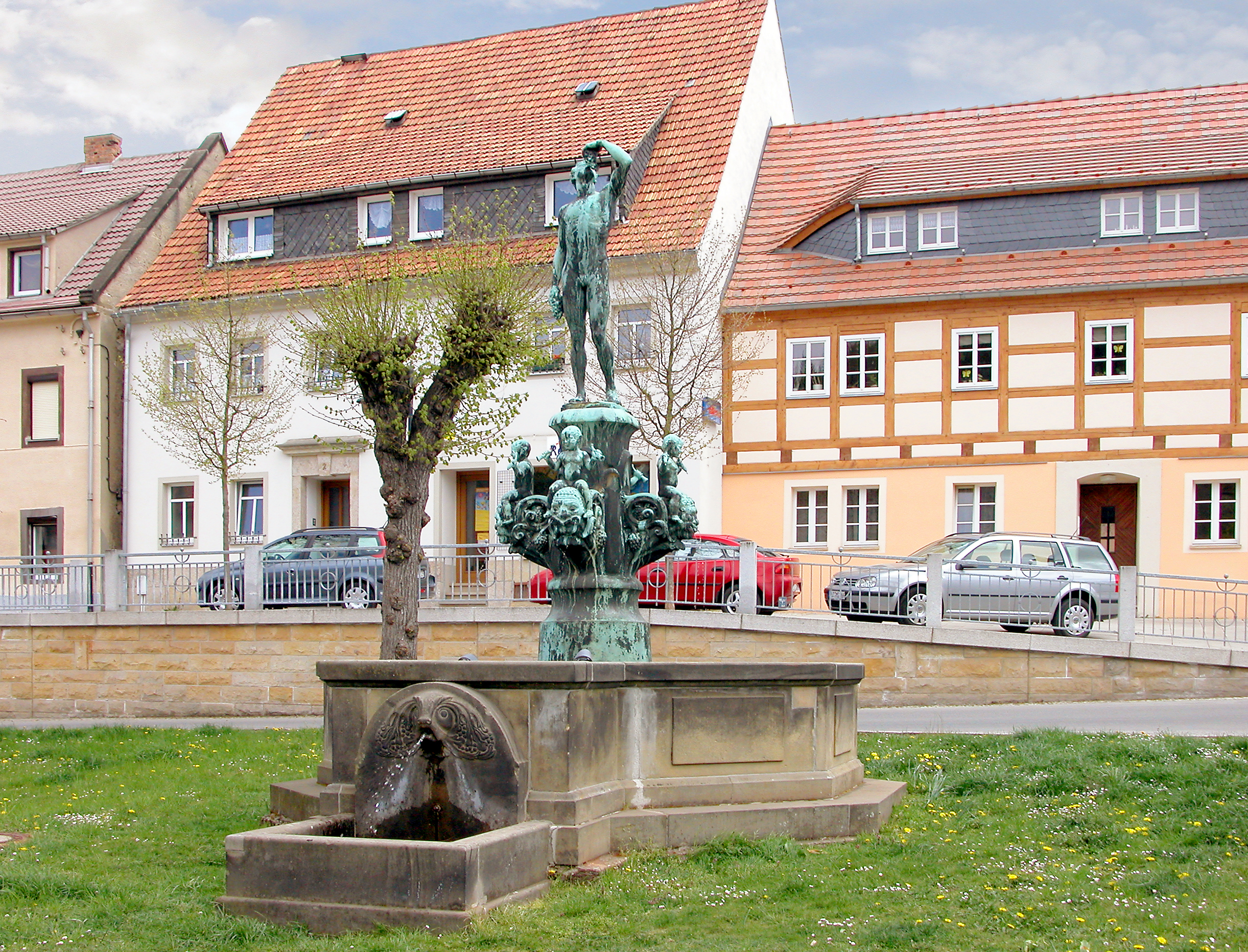 20.04.2007 01816 Bad Gottleuba (Bad Gottleuba-Berggießhübel): Bacchusbrunnen auf dem Marktplatz, 1915 geschaffen vom Bildhauer Alexander Höfer (GMP: 50.849288,13.941981). [DSCN22018.TIF]20070420060DR.JPG(c)Blobelt